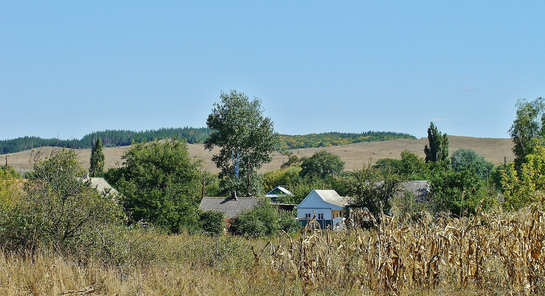 Село в Донецкой области на левом берегу реки Крынка.